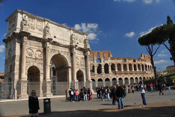 Exterior del Coliseo de Roma - Italia